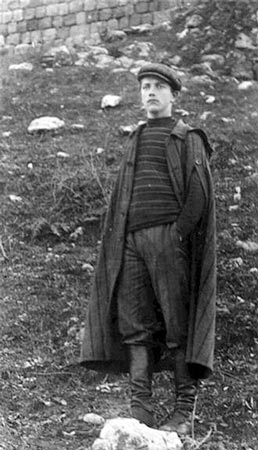 צילום של ברוך פירבר, שהיה הפצוע הראשון שטופל במסגרת שירותי בריאות כללית, שנת 1911